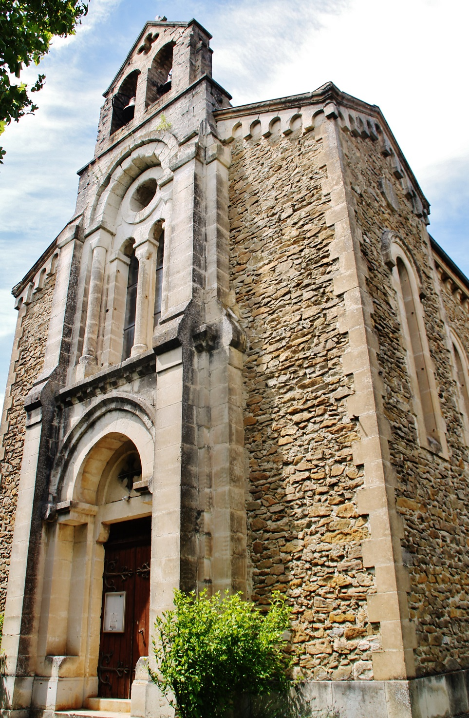 l'église